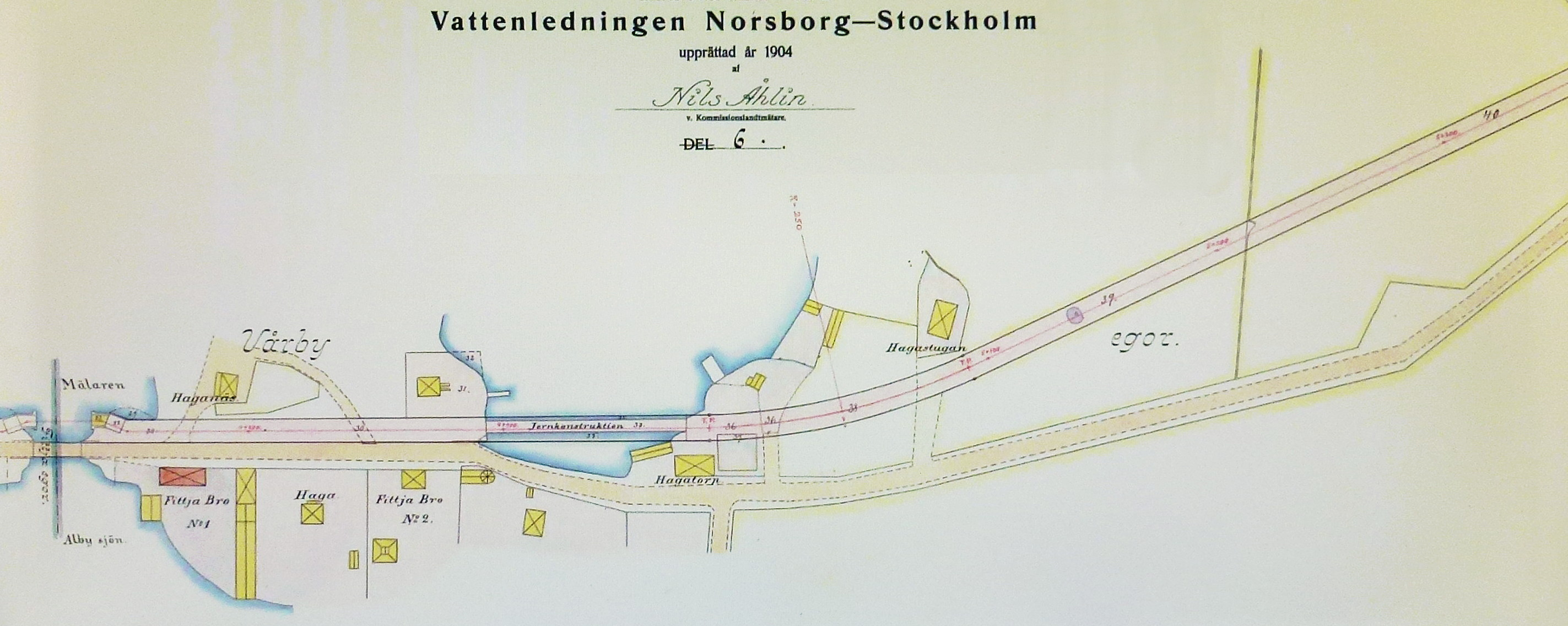 Uppmätningskarta för huvudvattenledning Norsborg-Stockholm, avsnitt med passage vid Fittja Bro och Vårbyviken